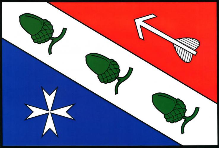 Miloňovice vlajka